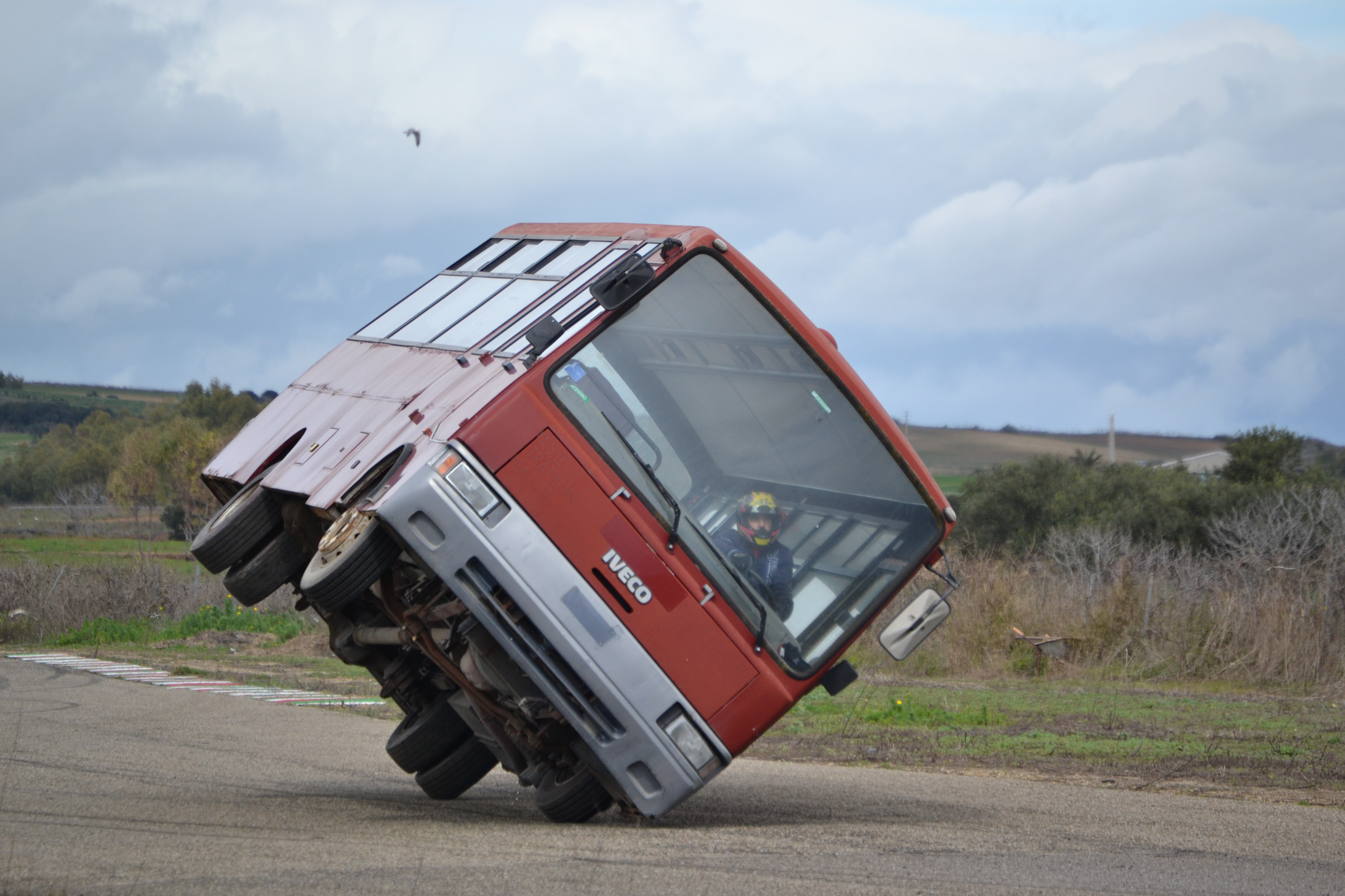 La guida acrobatica su due ruote effettuata da uno Stuntman con un pesante autobus